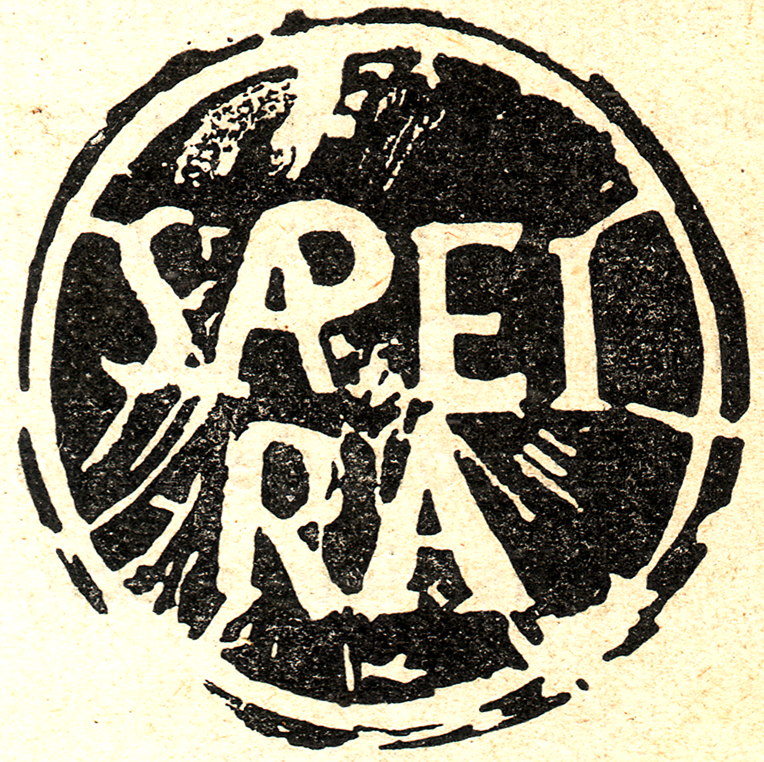 Antic segell municipal de Sapeira (Tremp, Pallars Jussà)